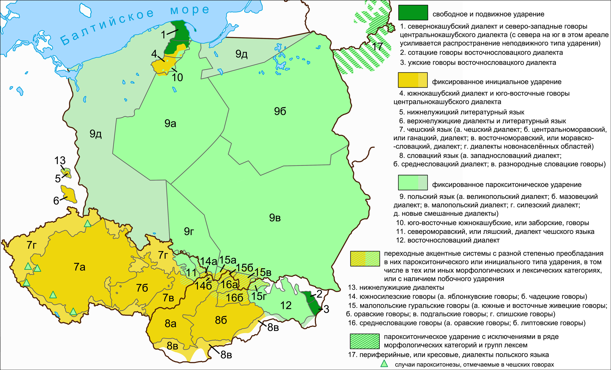 Карта распределения акцентных систем в ареале западнославянских языков и диалектов. На основе данных: Тихомирова Т. С. Польский язык // Языки мира: Славянские языки. — М.: Academia, 2005. — С. 7, 10. — ISBN 5-87444-216-2; Karaś H. Pod redakcją Haliny Karaś: Leksykon terminów i pojęć dialektologicznych. Akcent (польск.). Dialektologia Polska. Dialekty i gwary polskie. Kompendium internetowe; Topolińska Z. Z historii akcentu polskiego od wieku XVI do dziš. — Wrocław, Warszawa, Kraków: Zakład Narodowy im. Ossolińskich. Wydawnictwo Polskiej Akademii Nauk, 1961. — S. 86—117, Mapa nr 1 przedstawia przybliżony zasięg akcentuacji mieszanej (S. 276); Holly K. Fonetyka w gwarze Żywiecczyzny (Prace Instytutu Języka Polskiego). — Kraków: Polska Akademia Nauk, Instytut Języka Polskiego, 1993. — S. 62 — ISBN 83-85579-11-7; Калнынь Л. Э. Типология звуковых диалектных различий в нижнелужицком языке. — М.: Наука, 1967. — С. 78—83; Скорвид С. С. Чешский язык // Языки мира: Славянские языки. — М.: Academia, 2005. — С. 4—5. — ISBN 5-87444-216-2; Смирнов Л. Н. Словацкий язык // Языки мира. Славянские языки. — М.: Academia, 2005. — С. 281, 307. — ISBN 5-87444-216-2; Buffa. F. Východoslovenské nárečia // Vlastivedný Časopis. IX. — Bratislava, 1962. Ермакова М. И., Недолужко А. Ю. Серболужицкий язык // Языки мира. Славянские языки. — М.: Academia, 2005. — С. 316. — ISBN 5-87444-216-2; Михалк Ф. Краткий очерк грамматики современного верхнелужицкого литературного языка // Верхнелужицко-русский словарь. — 1974. — С. 473—474